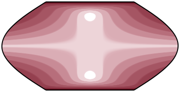 mira zkresleni